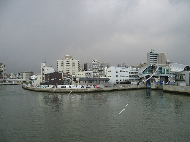 木津川（左側）にja:道頓堀（右側の水門）が合流 大正橋上から